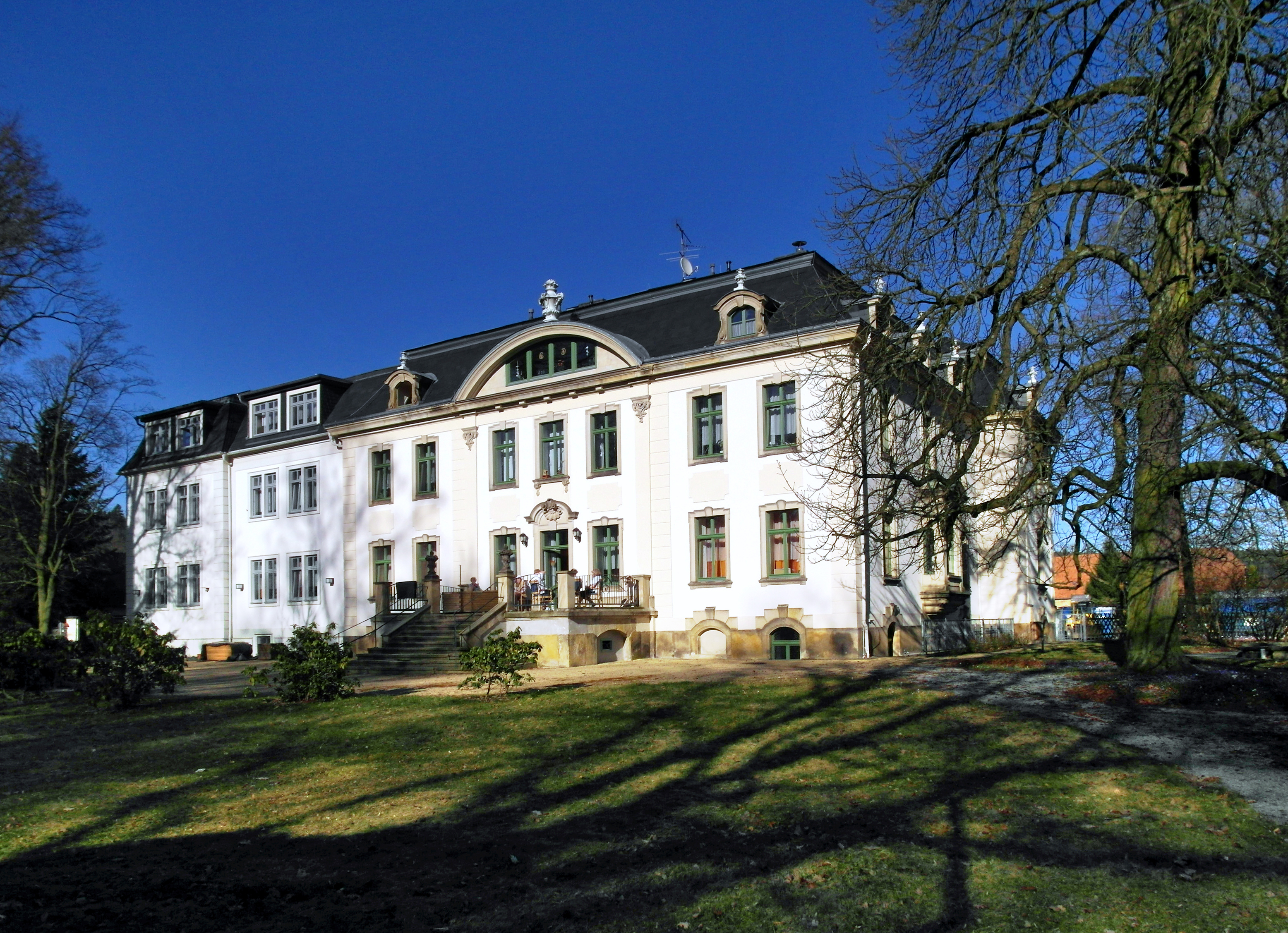 27.03.2017 02742 Friedersdorf (Neusalza-Spremberg) Am Pflegeheim 4: Schloß Friedersdorf, heute Seniorenheim SB-Pflegeheim. Auf dem Niederfriedersdorfer Gut von 1887-89 unter Hans Leo von Oppell nach Plänen des Architekt Heinrich Schubert erbaut. In der DDR war es bis 1957 Schulungsheim der CDU und seit 1961 Altersheim. Seit der Wende führt der Arbeiter-Samariter-Bund Löbau das Seniorenheim. Sicht aus dem Park von Südwesten. [SAM9047.JPG]20170327535DR.JPG(c)Blobelt